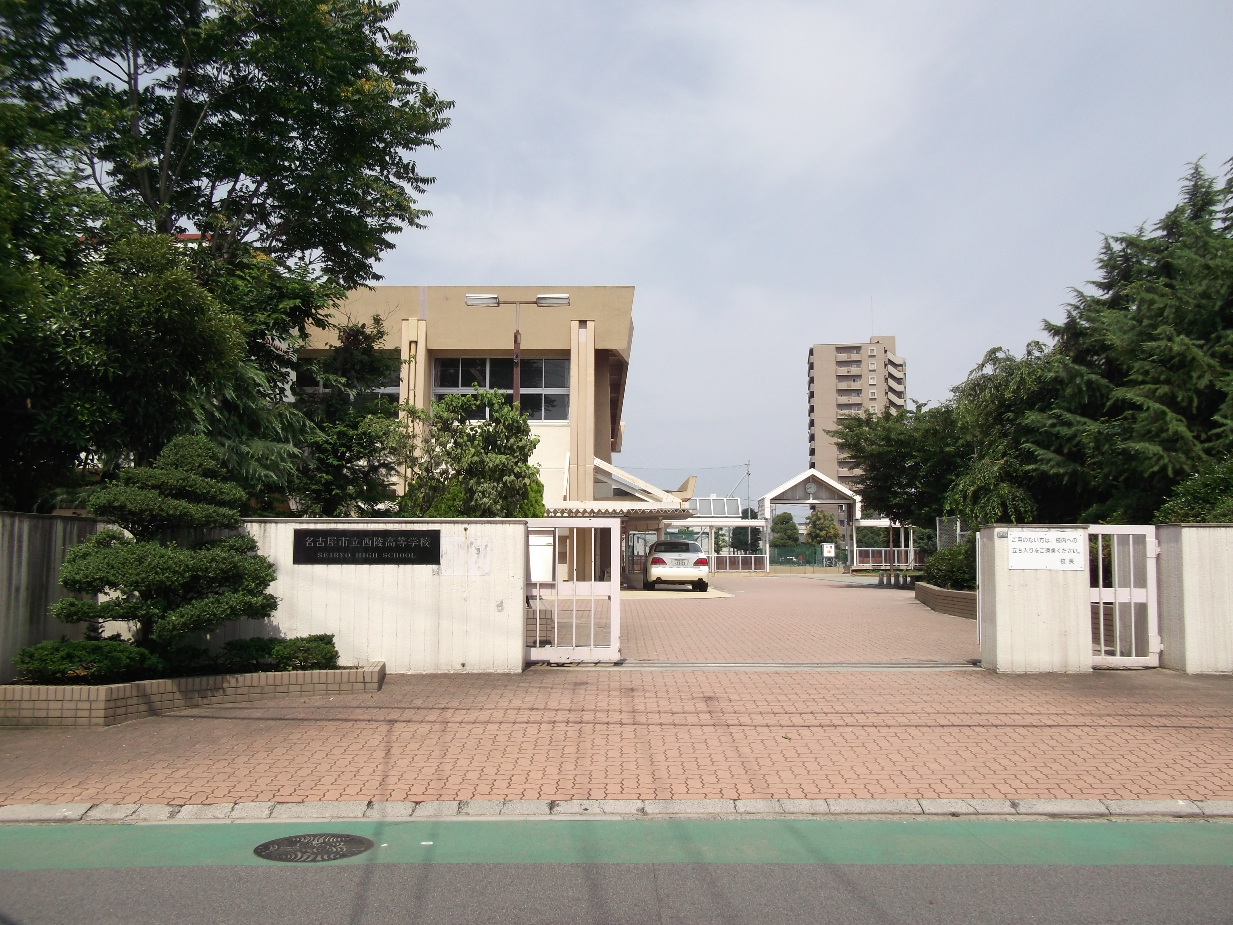 名古屋市西区の名古屋市立西陵高等学校を東側公道より撮影